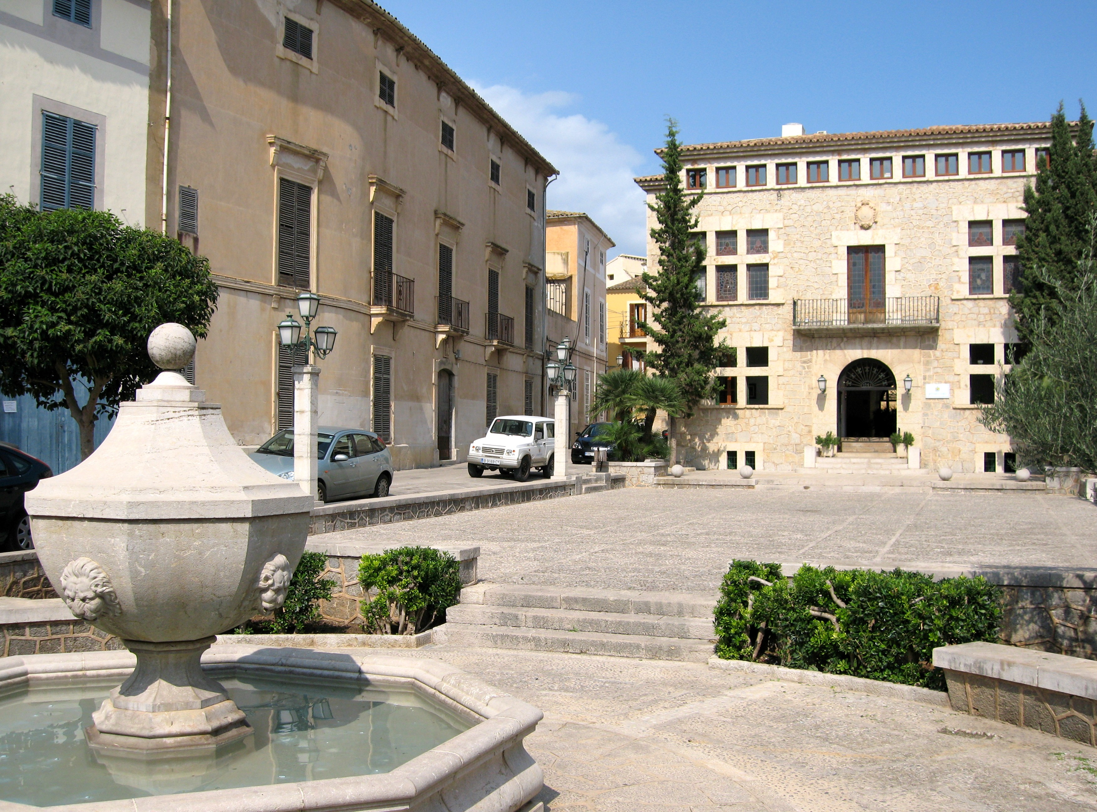 Ajuntament d'Artà, Plaça de l'Ajuntament, Artà, Mallorca, Spain